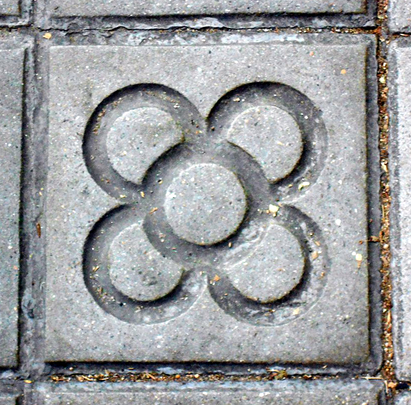 Loseta de la "flor de Barcelona", diseñada por Josep Puig i Cadafalch.